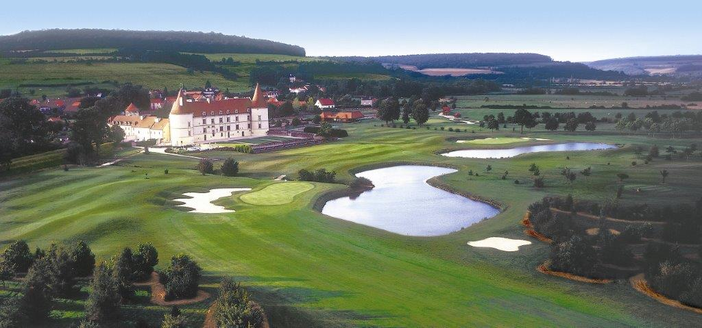 Vue aérienne vers le nord-ouest, château et golf ; la façade Est du château vue ici tournée vers son parc, est tournée vers l'est-quart-sud-est. L'eau des pièces d'eau vient du ru Billon. Le château est contourné côté entrée par la rigole d'alimentation du réservoir de Cercey, qui arrive par le nord (ici derrière le château, un peu à droite), jusqu'à sa façade sud. Elle s'en éloigne vers le sud (ici vers la gauche) le long de l'allée bordée de quelques arbres et que l'on voit menée ici depuis le bord gauche de la photo jusqu'à la façade sud du château. Cette rigole conflue avec le ru Billon précisément ici, au coin sud-est du château, près du bosquet d'arbres le long du chemin. Le ru Billon traverse ensuite la pelouse vers la droite (vers l'est) jusqu'à la pièce d'eau visible ici devant le château ; ce faisant il est enjambé par les deux passerelles également visibles ici. Le ru Billon devient le Rubillon en aval du château, après cette confluence. Il est lui-même affluent de l'Armançon.